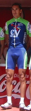 Comunidad Valenciana, Euskal Bizikleta 2005